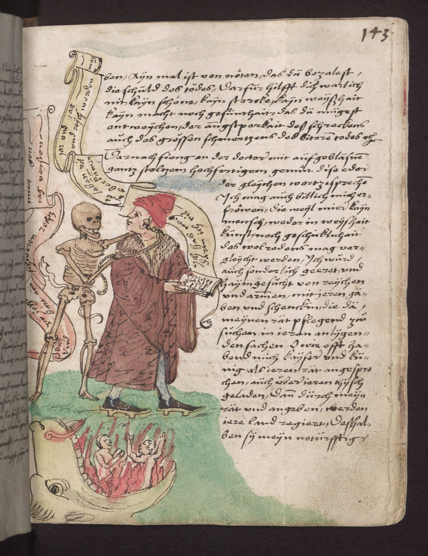 Seite aus dem Vergänglichkeitsbuch des Wilhelm Werner von Zimmern, Württembergische Landesbibliothek, Cod. Don. A III 54, fol. 143r, Pierre Desrey de Troyes: Visio Heremitae (deutsch)